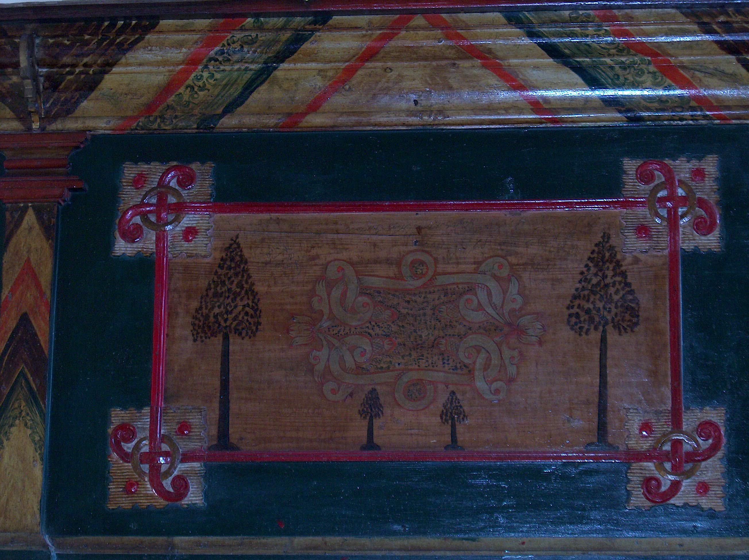 Vámosoroszi Református Templom - karzat